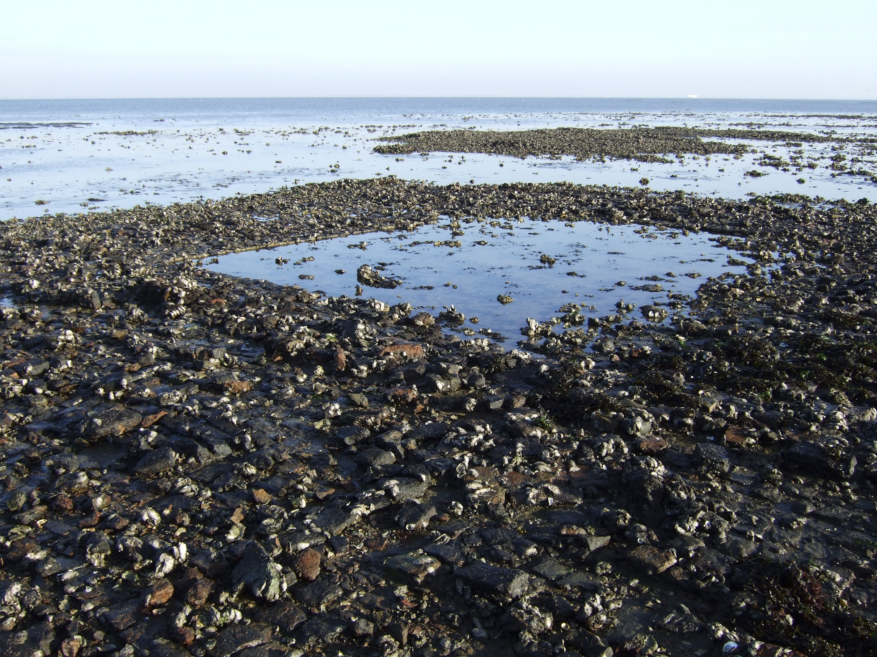 Archeologie/ Cultuurlandschap: Overzicht van ondergelopen strand, met zicht op de vermoedelijke fundering van de kerktoren van het verdronken Middeleeuws dorp Nieuwlande Archeoregio 15, AMK-terrein 49C-001 (opmerking: Publicatie Uit Balans 2006)